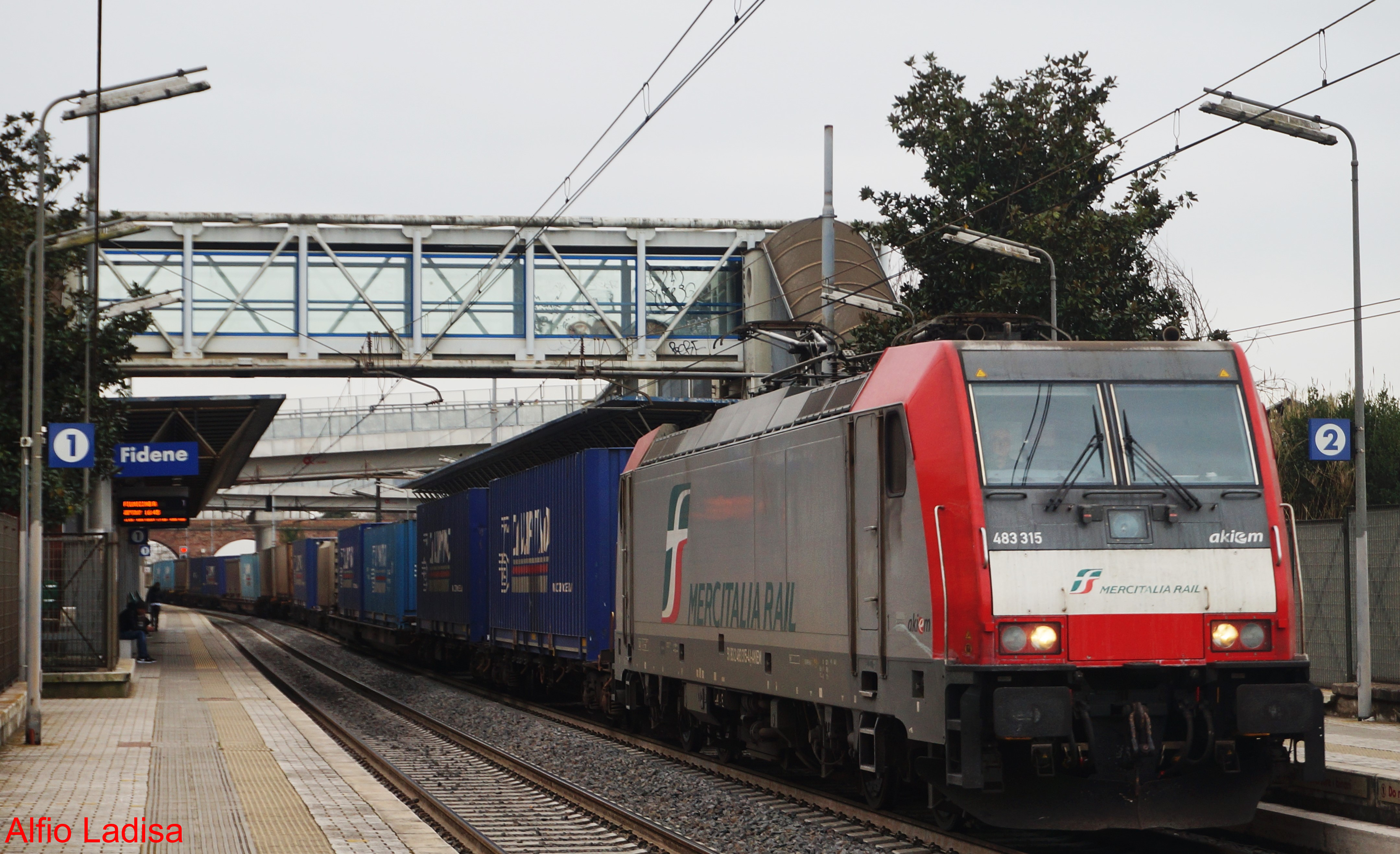 La E.483.315 di Akiem, noleggiata a Mercitalia Rail, traina un treno merci in transito nella stazione di Fidene (RM)